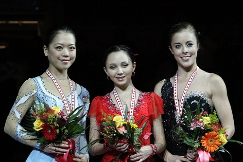 Подиум 2011 Skate Canada International в женском одиночном катании. Слева на право: Акико Судзуки, Елизавета Туктамышева, Эшли Вагнер